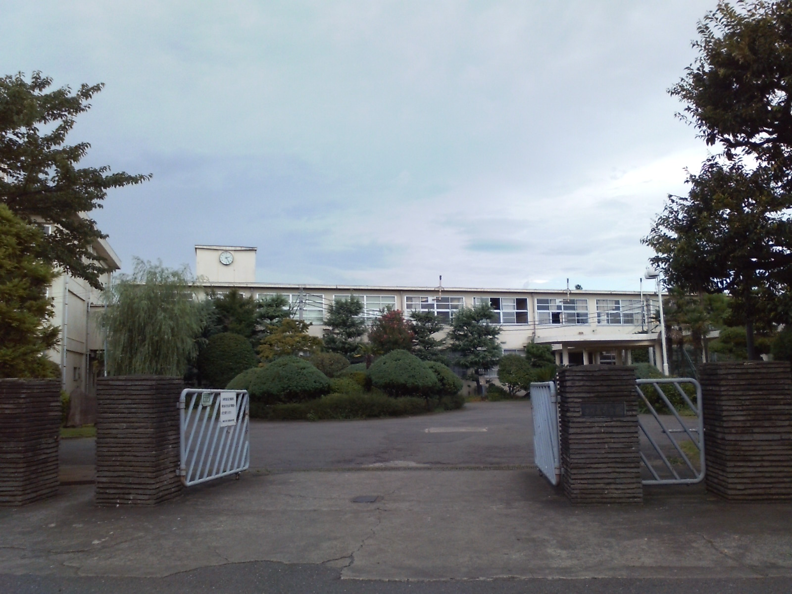 県立多摩高校 正門から撮影